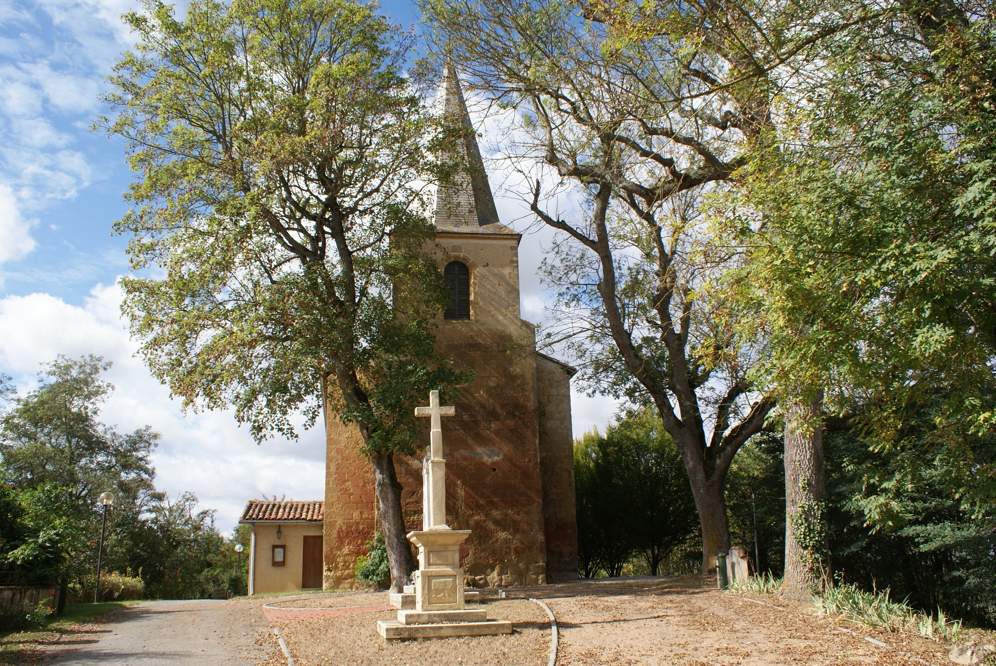 Monties (Gers, Frankrijk) : De kerk.